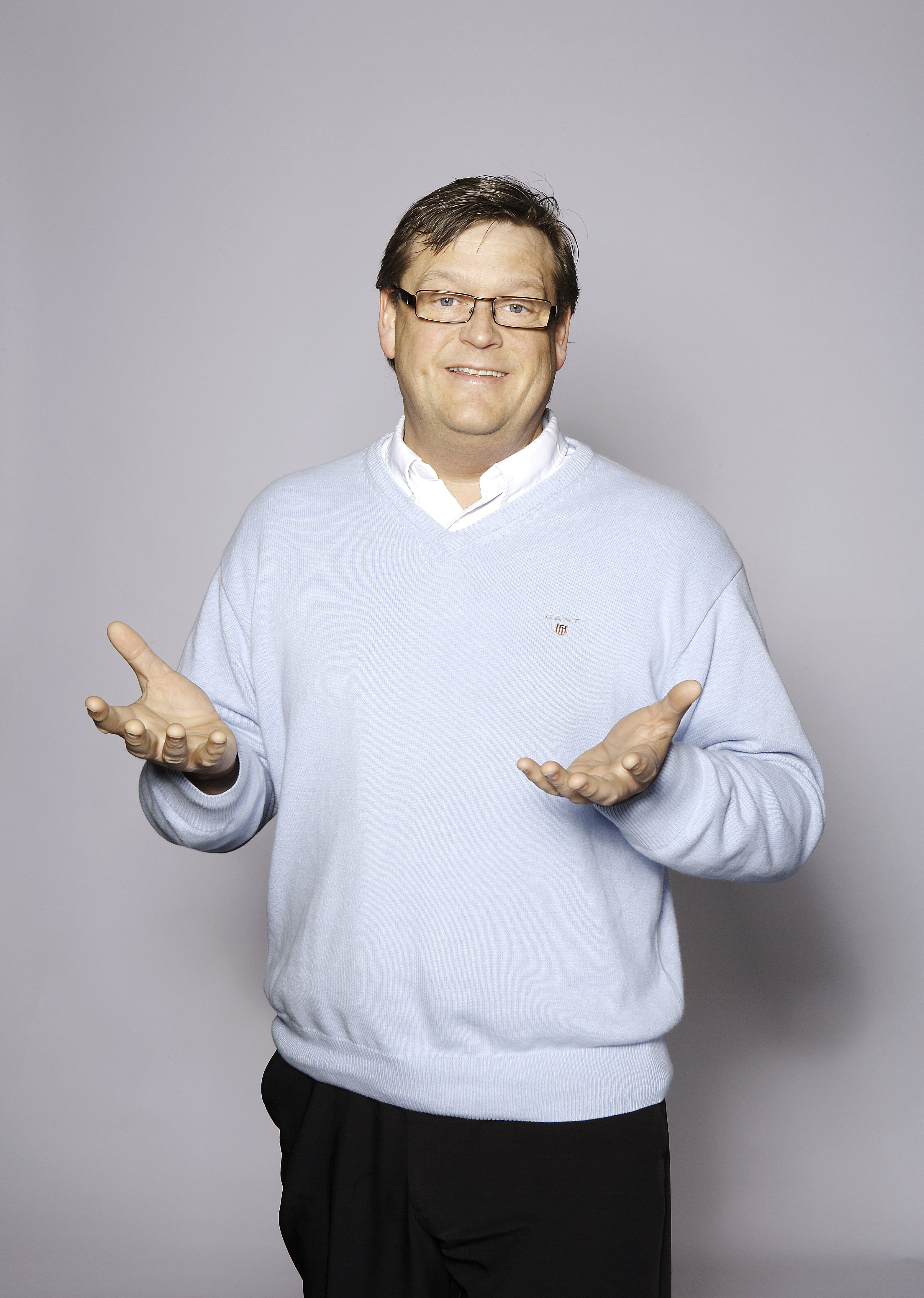 Harald Tom Nesvik, FrP-politiker